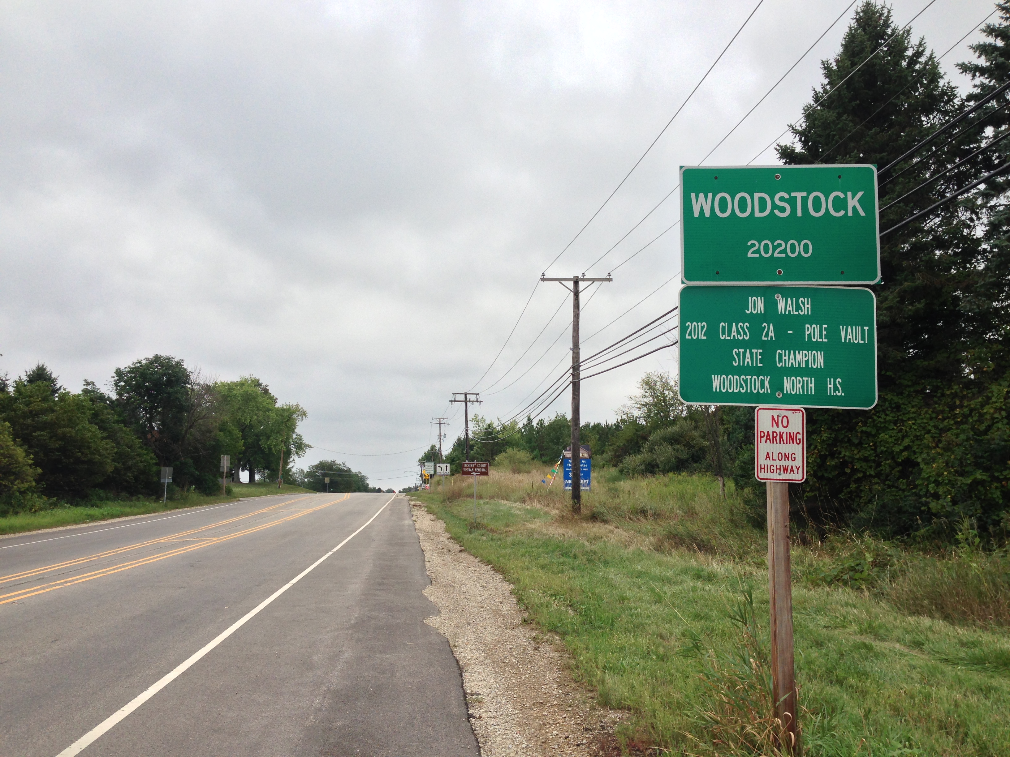 Woodstock il sign